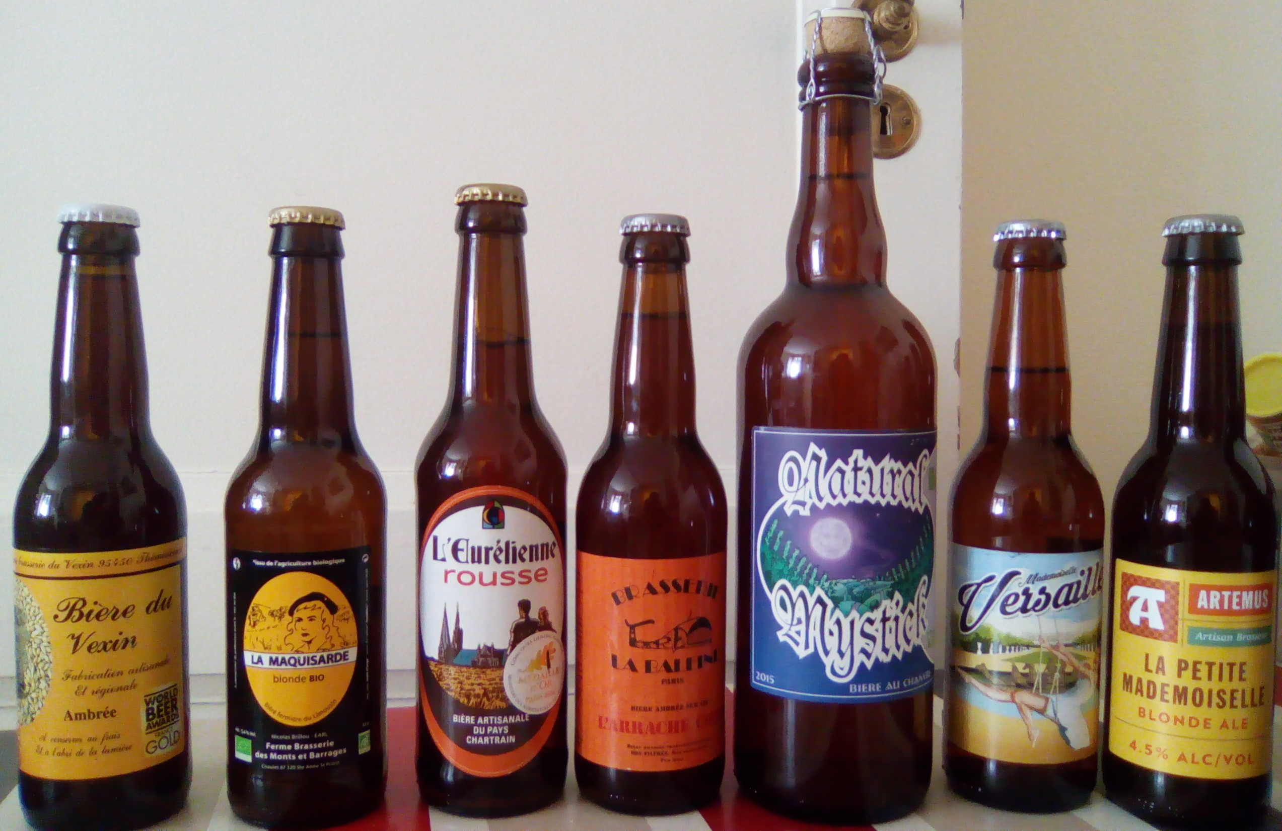 Bouteilles de bières artisanales françaises : "L'Eurélienne", "Natural Mystick", "La Maquisarde", "Bière du Vexin", Mademoiselle Versailles", "L'Arrache coeur" de la brasserie La Baleine, "La Petite Mademoiselle" de la brasserie Artemus.